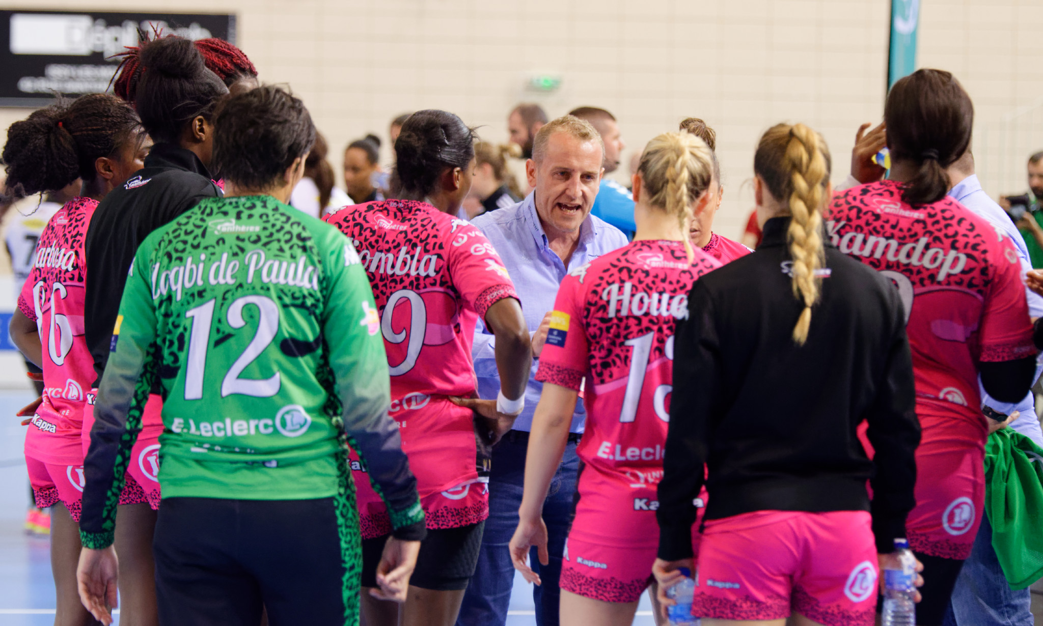 Demie-finale aller de playoff entre Issy Paris Hand et Fleury. A Issy Les Moulineaux, le 22 avril 2016.